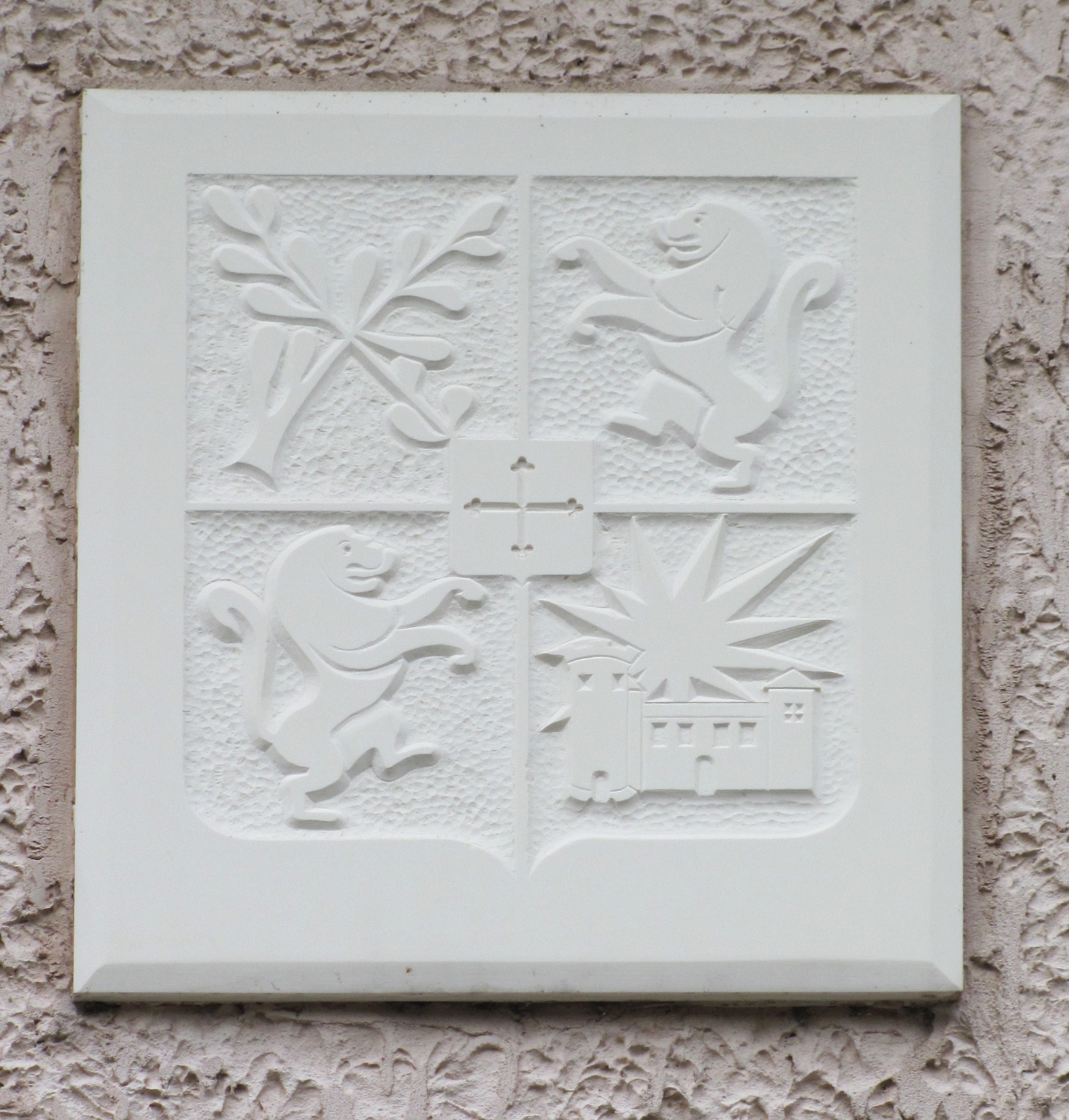 Armes de Beynost, rue centrale